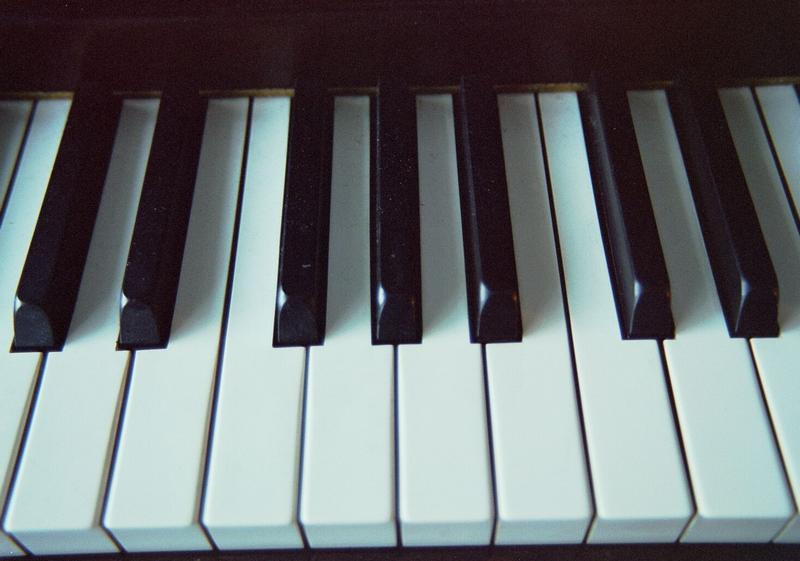 teclado de a dinatonica